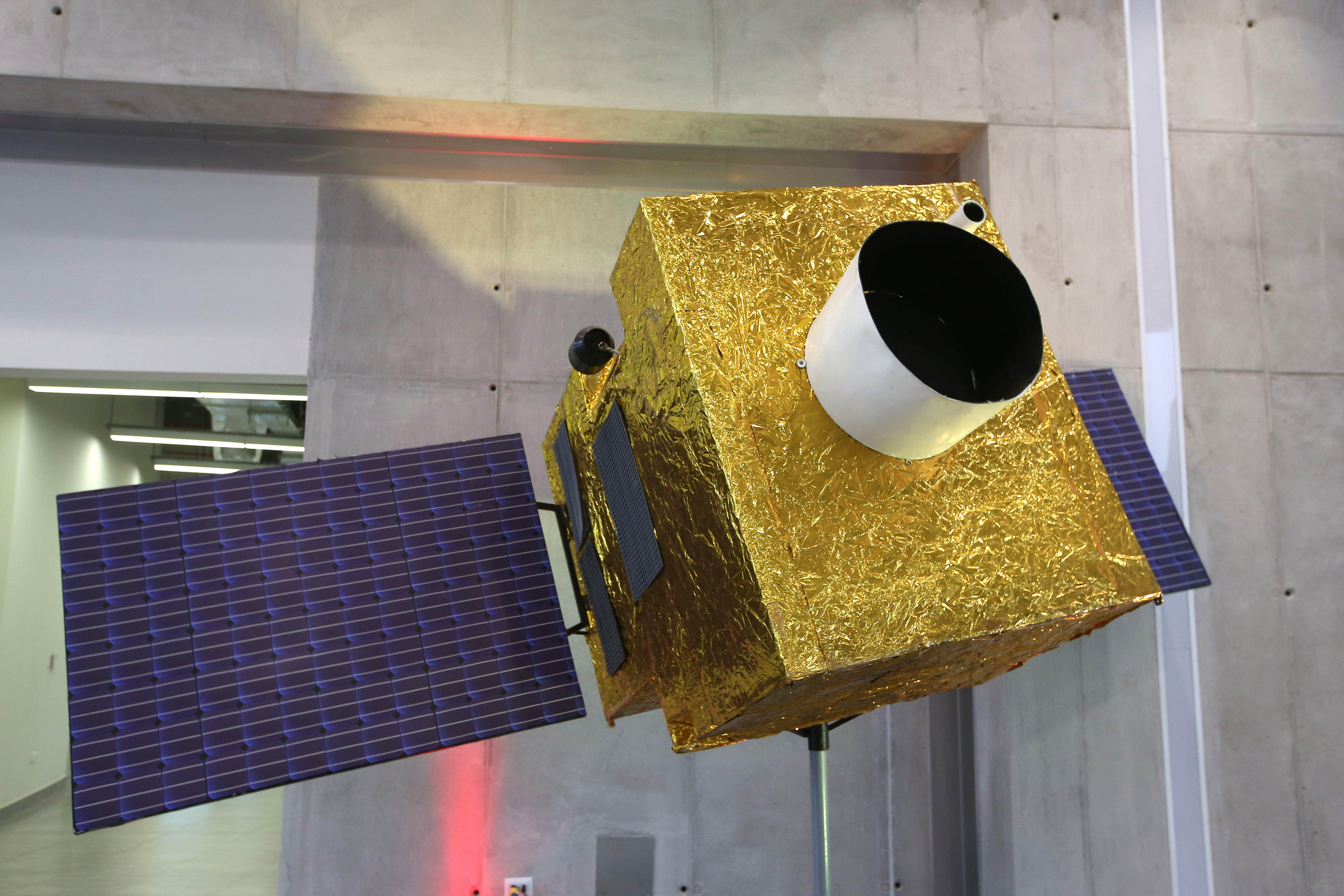 Modelo del Perú Sat - 1